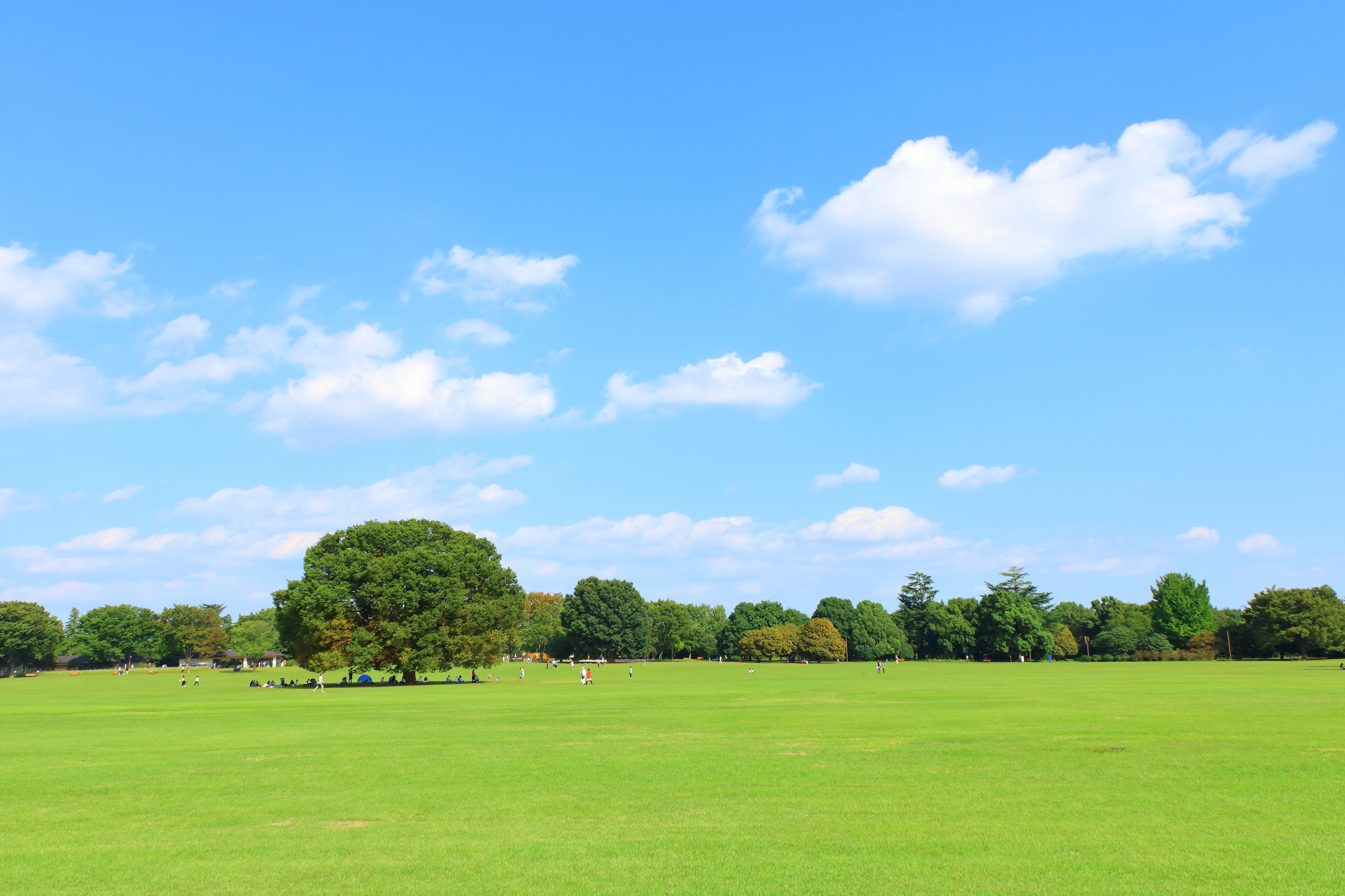 国営昭和記念公園「みんなの原っぱ」